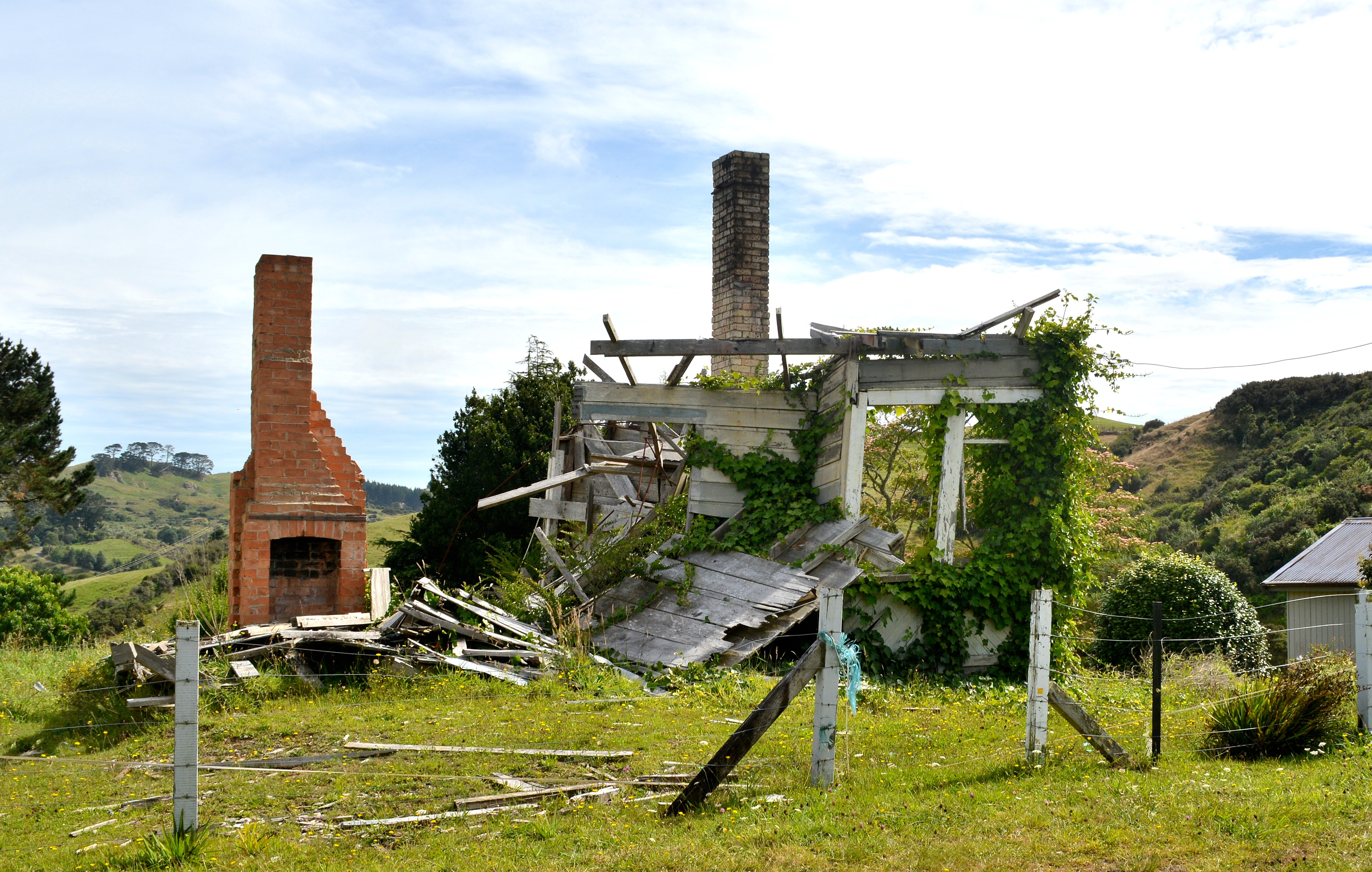 At Glen Massey,New Zealand